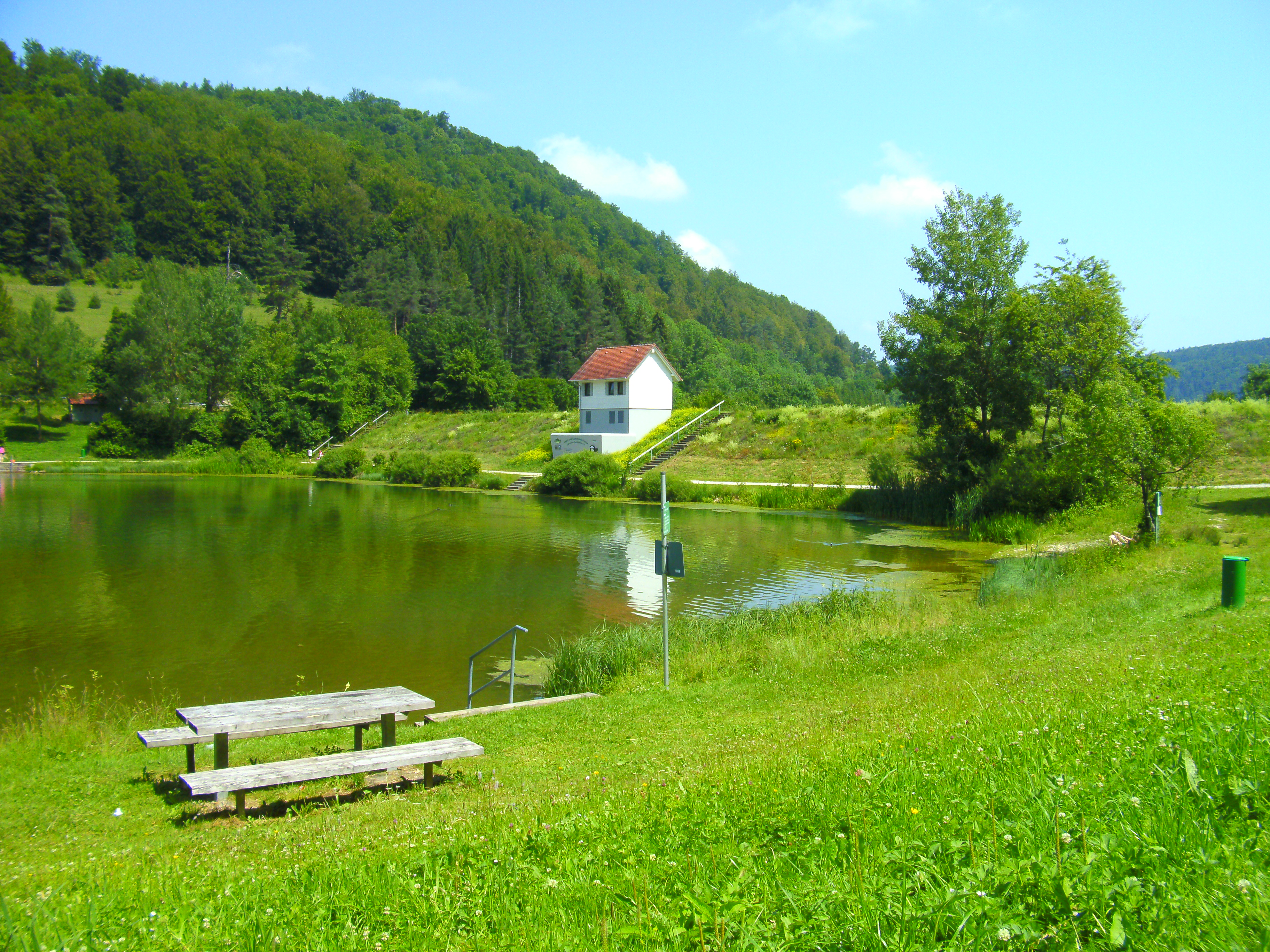 Stausee Kohlstatt-Brunnenbach in Meßstetten-Oberdigisheim (in der Nähe von Obernheim), Zollernalbkreis, Baden-Württemberg; LSG „Großer Heuberg“ im Naturpark Obere Donau